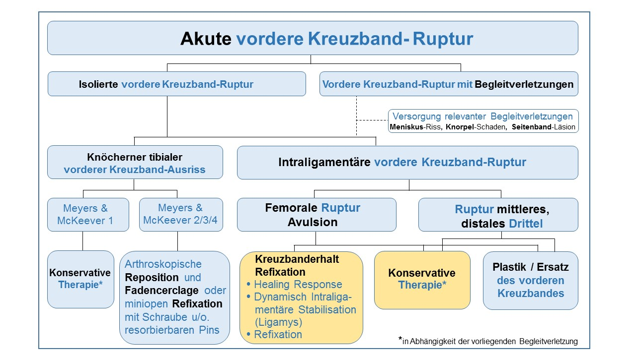 Quelle: AGA-Komitee-Knie-Ligament 2016 Abb. 5.1a S. 53, Untersuchungsheft Diagnostik des Kniebandapparates